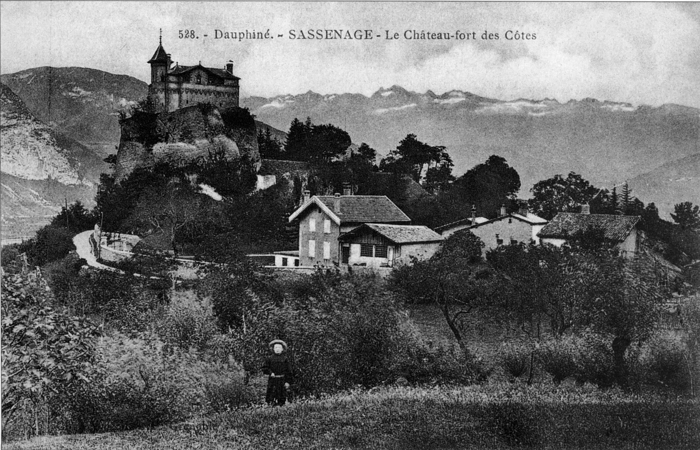 Sassenage, le château-fort des Cotes